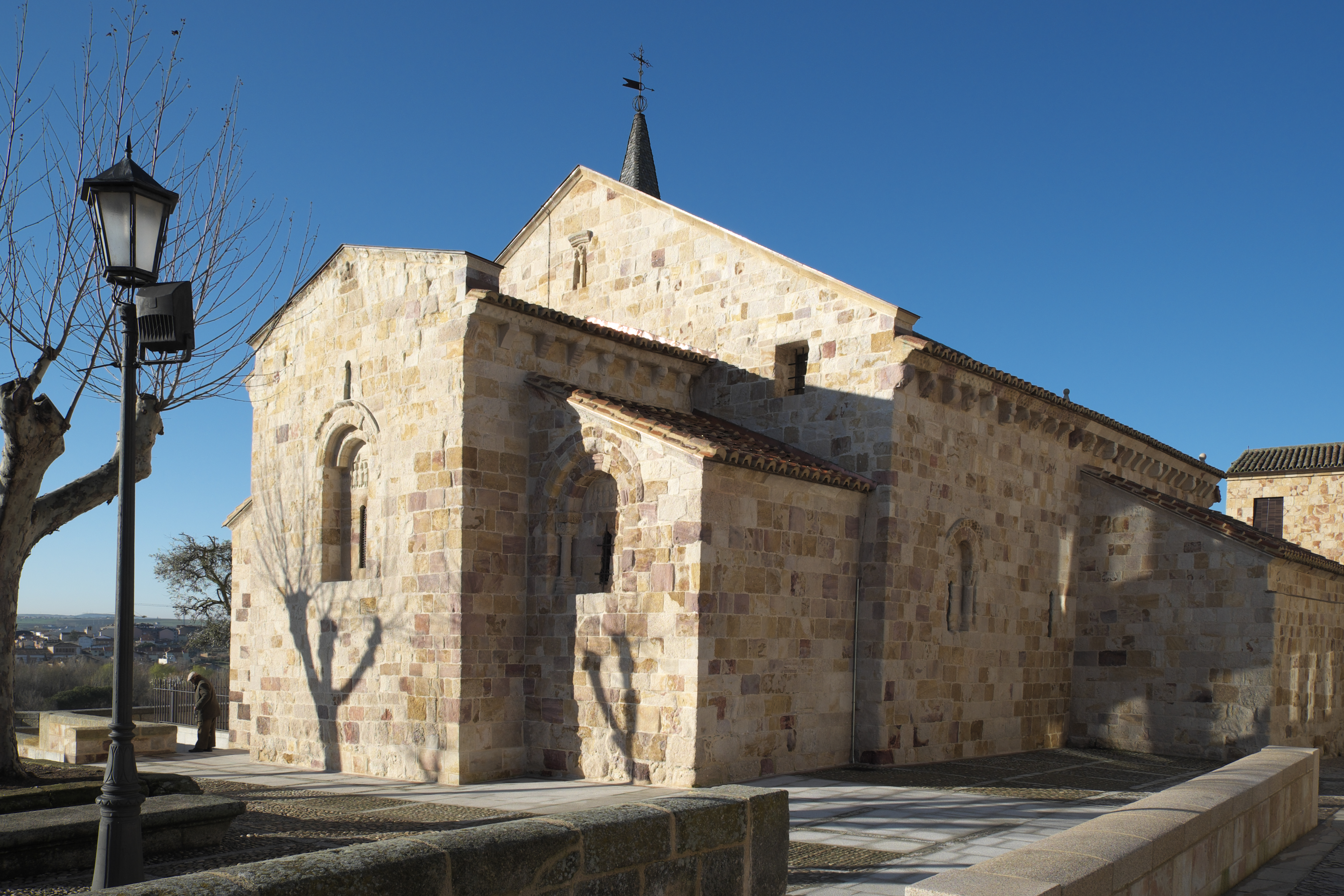 Kirche San Cipriano in Zamora (Kastilien-León/Spanien)